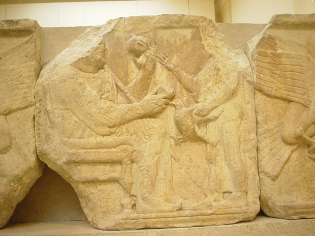 Elgin marble